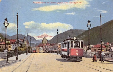 Bolzano, ponte sul Talvera, 1910